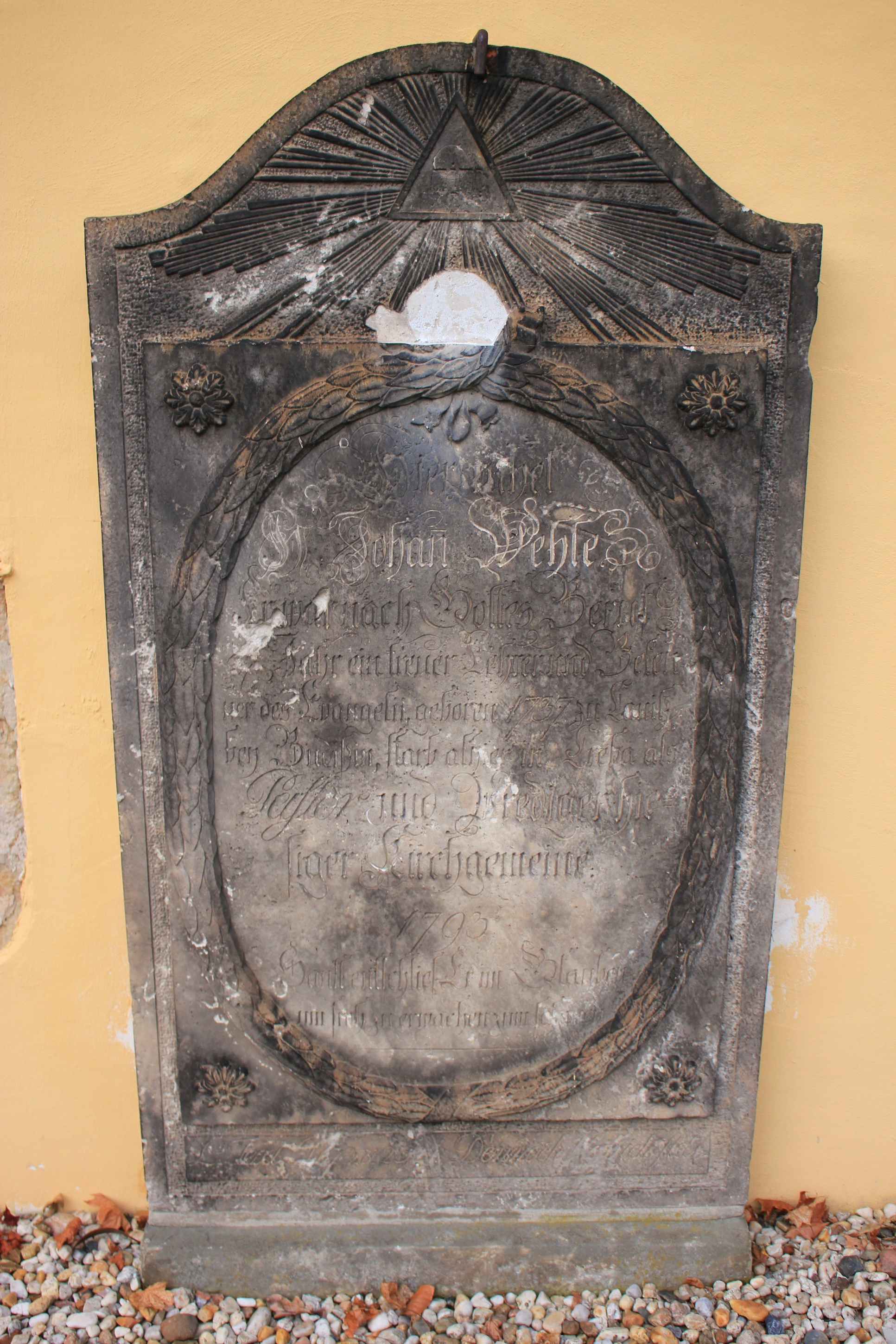 Hornjoserbsce: Narowny pomnik fararja Jana Wjele (nana Hendricha Božidara Wjele) při cyrkwi w Chrjebi.